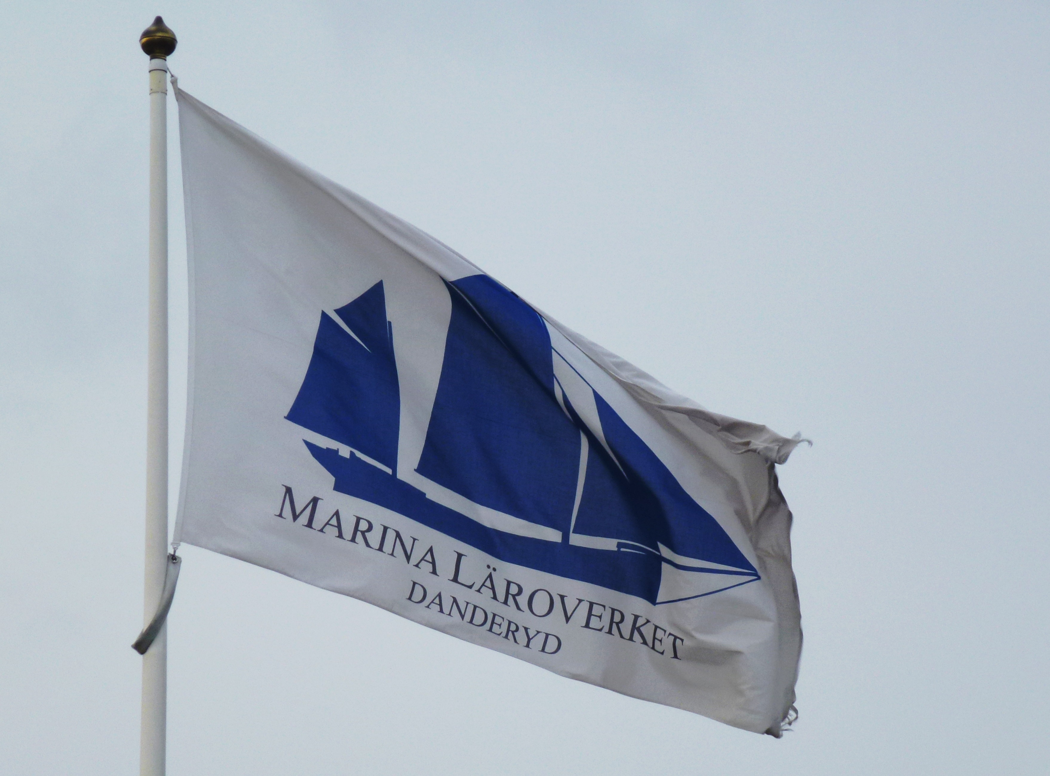 Marina läroverket flagga